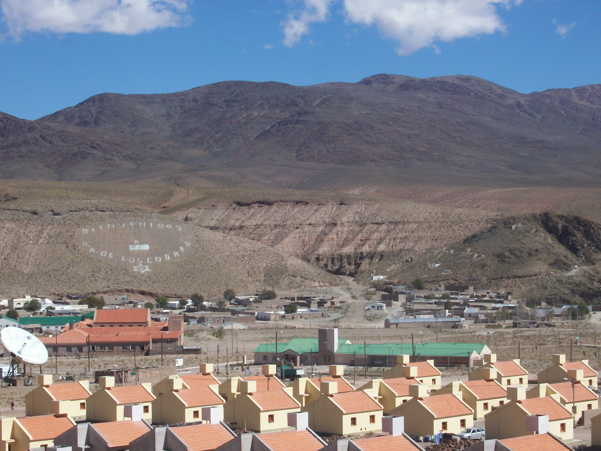 San Antonio de los Cobres visto desde la RN51